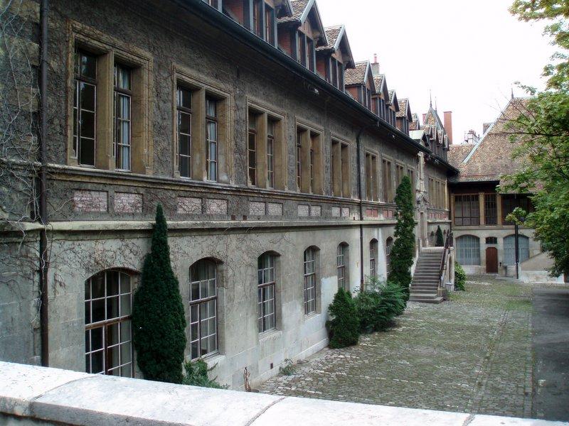 La façade nord du bâtiment sud du Collège Calvin.